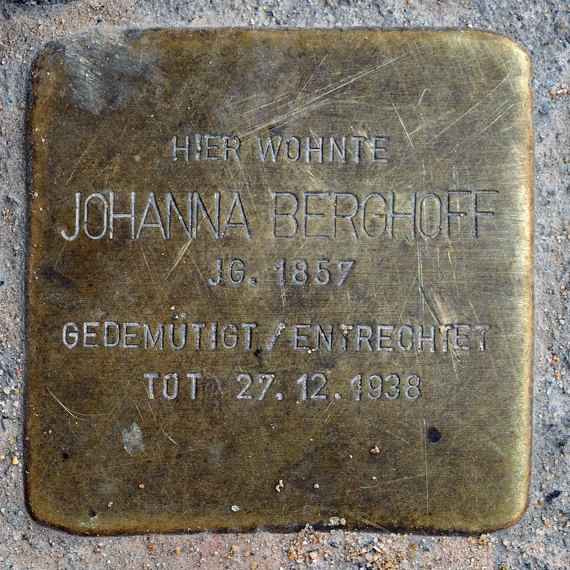 Stolpersteine in Kempen: Johanna Berghoff, Engerstraße 38